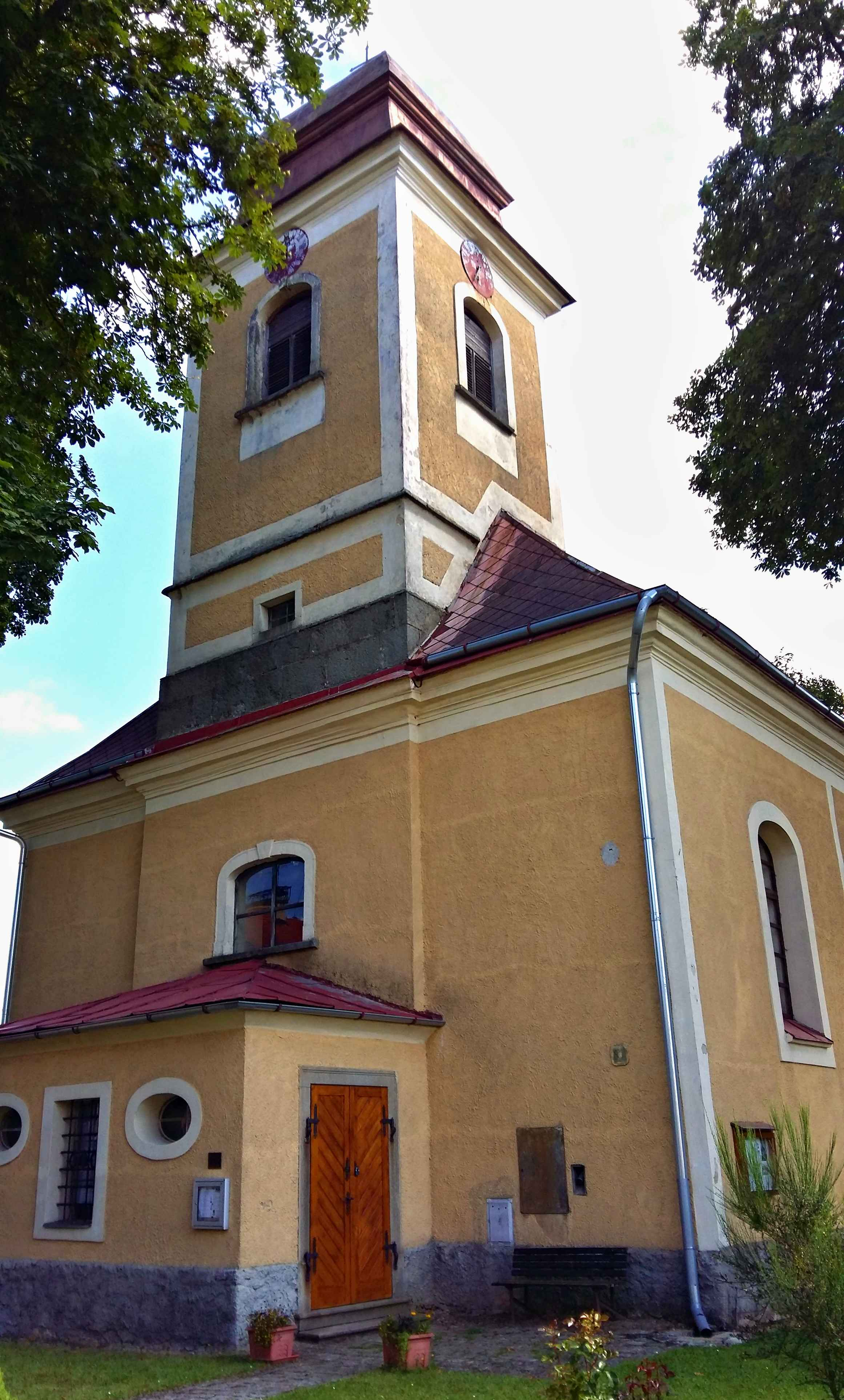 Milíře Kostel svatého Petra a Pavla